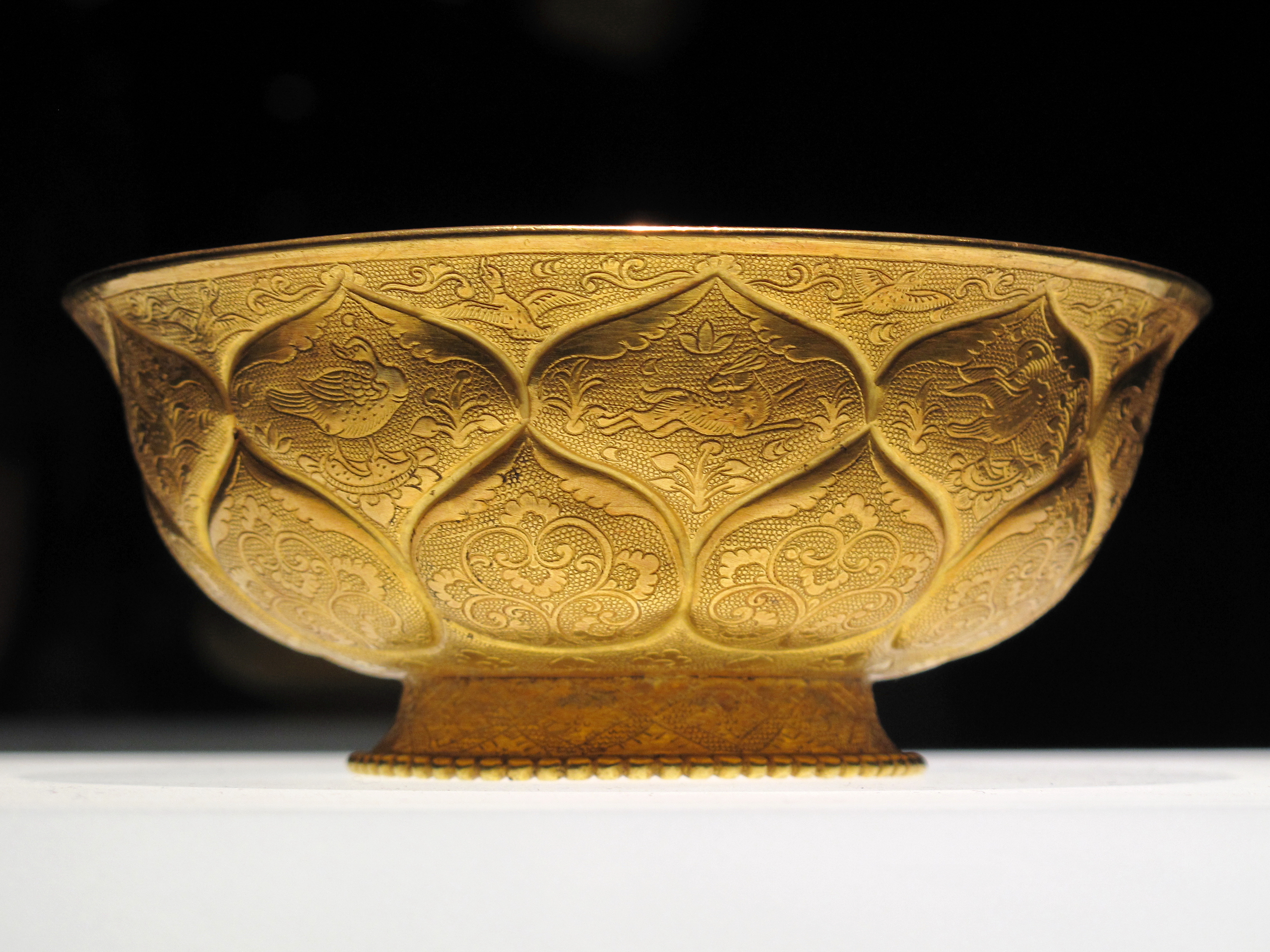 鸳鸯莲瓣纹金碗，1970年西安市南郊何家村窖藏出土，藏于陕西历史博物馆。